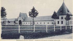 Ferme S.I.A.S